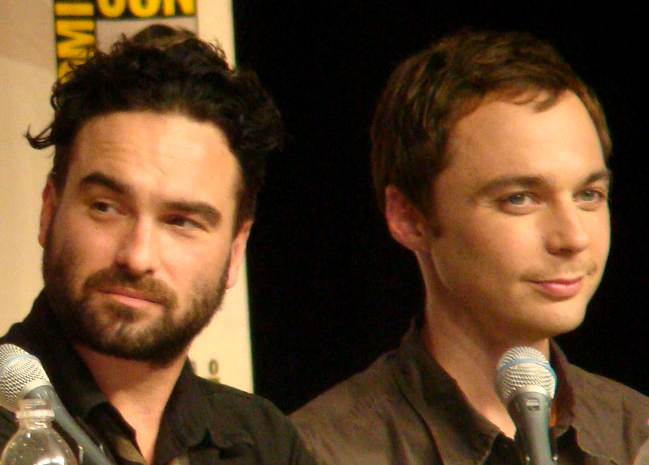 Zac Levi, Rebecca Romijn, Johnny Galecki & Jim Parsons